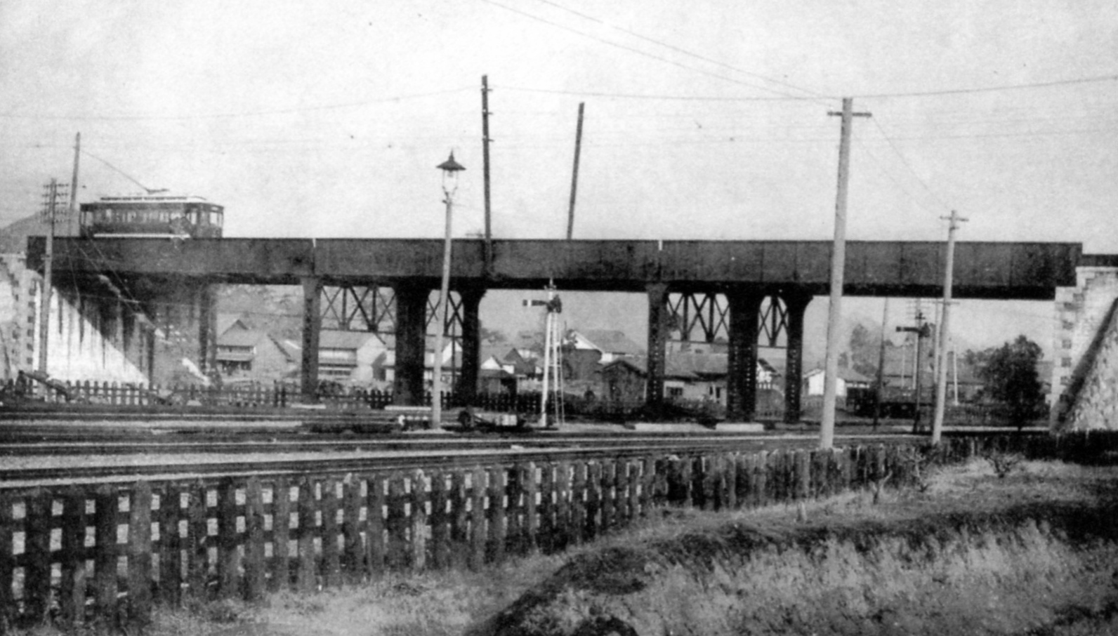 美濃電笠松線の電車が国鉄岐阜駅構内の跨線橋を渡る。